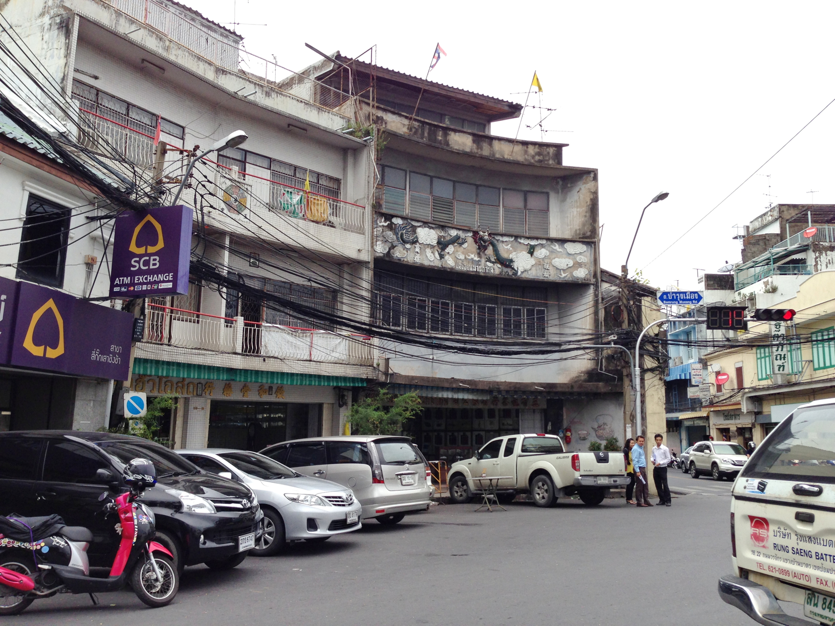 Thanon bamrung muang- fuang Nakhon, san caho Pho sua, phra Nakhon, bangkok